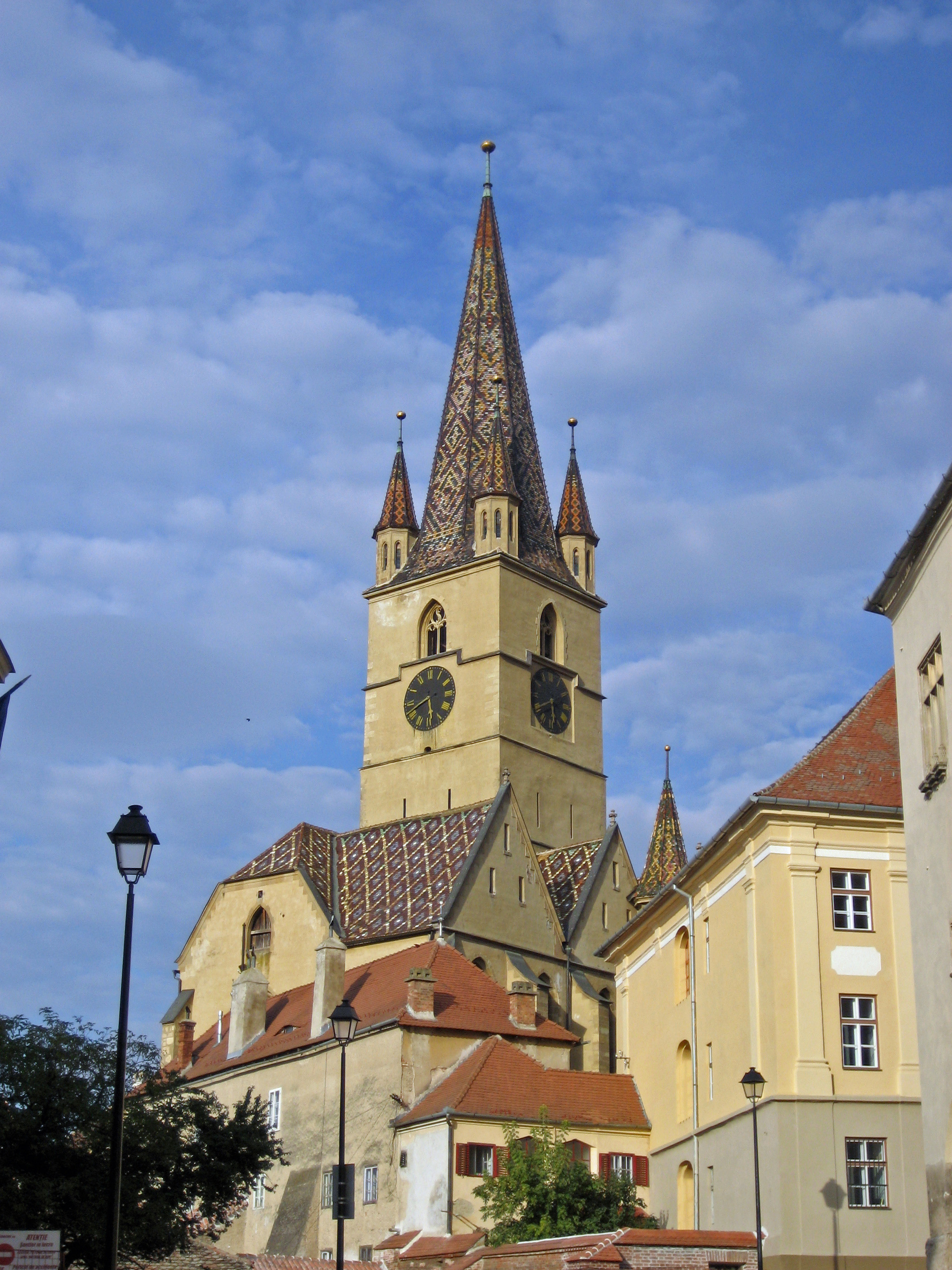 Sibiu (Hermannstadt), Romania